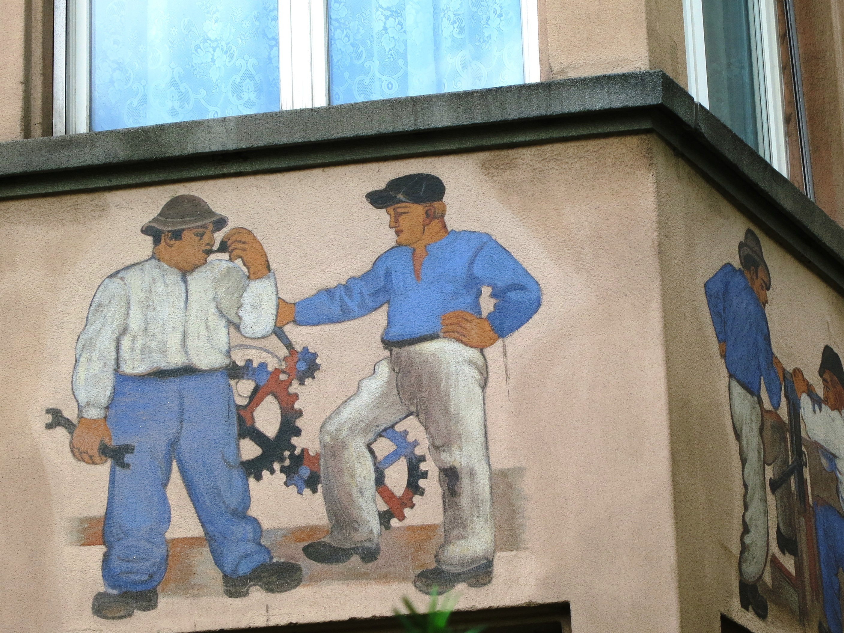 Wohnkolonie Kanzleistrasse ABZ 1930, Zürich-Hard, Schweiz